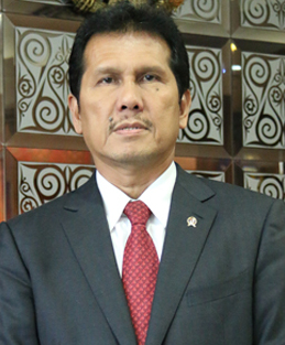 Menteri Pendayagunaan Aparatur Negara Dan Reformasi Birokrasi Indonesia Asman Abnur